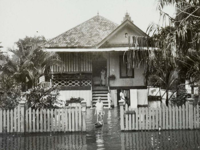 Foto. Tijdens hoog water ondergelopen tuin van het huis met nummer 34 op de Boekit Ketjil in Palembang